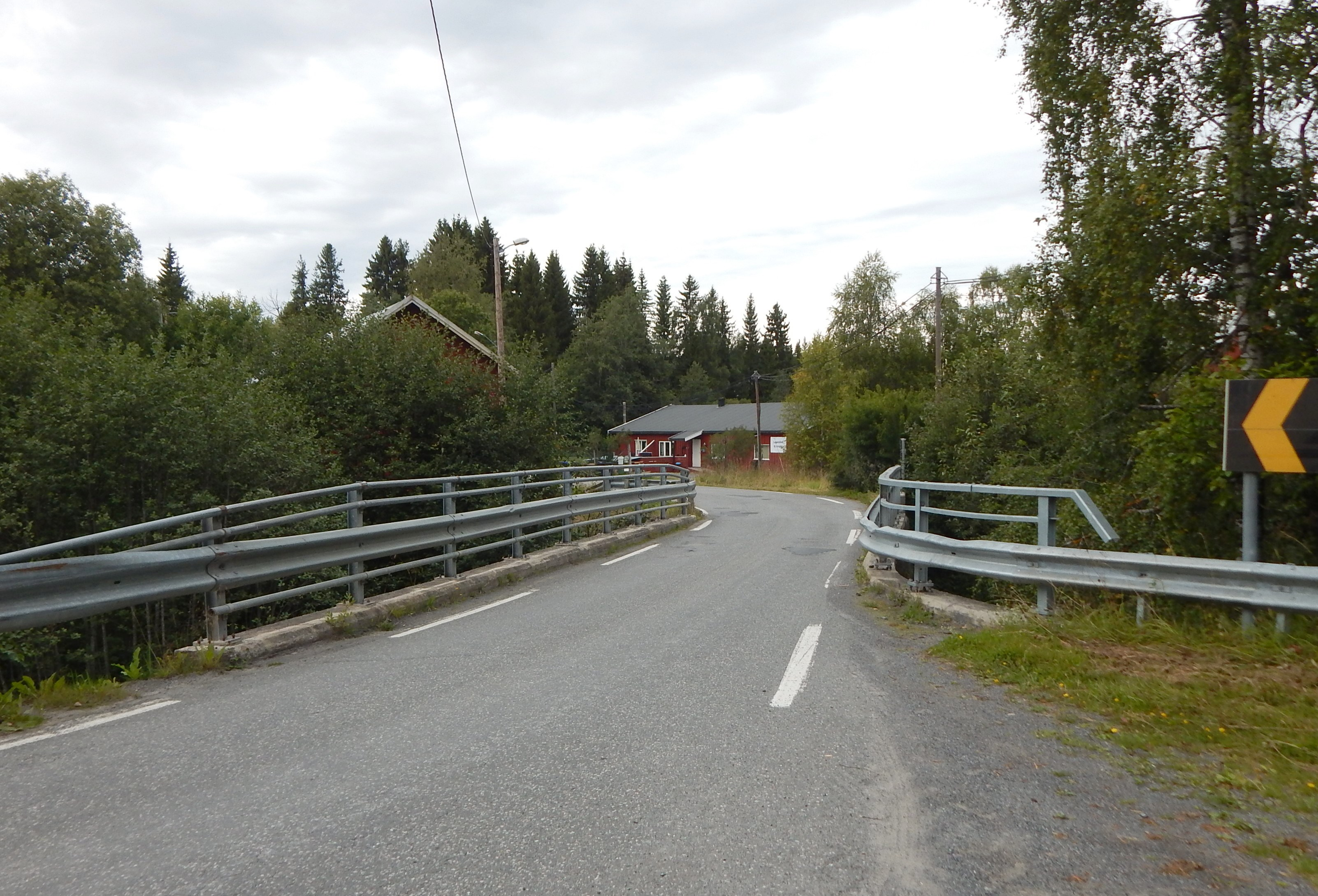 Reinsvoll bru i Midtåsen (fylkesvei 2382, tidl. 123) like ved Reinsvolldammen